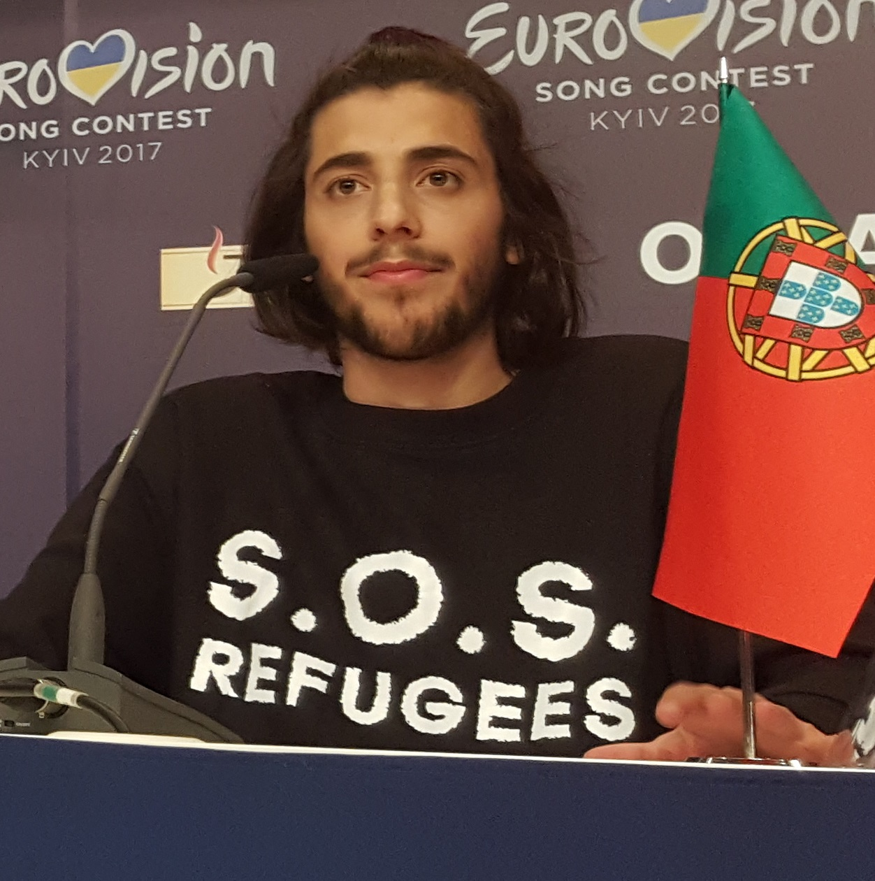 Portugalski piosenkarz Salvador Sobral w maju 2017 roku.